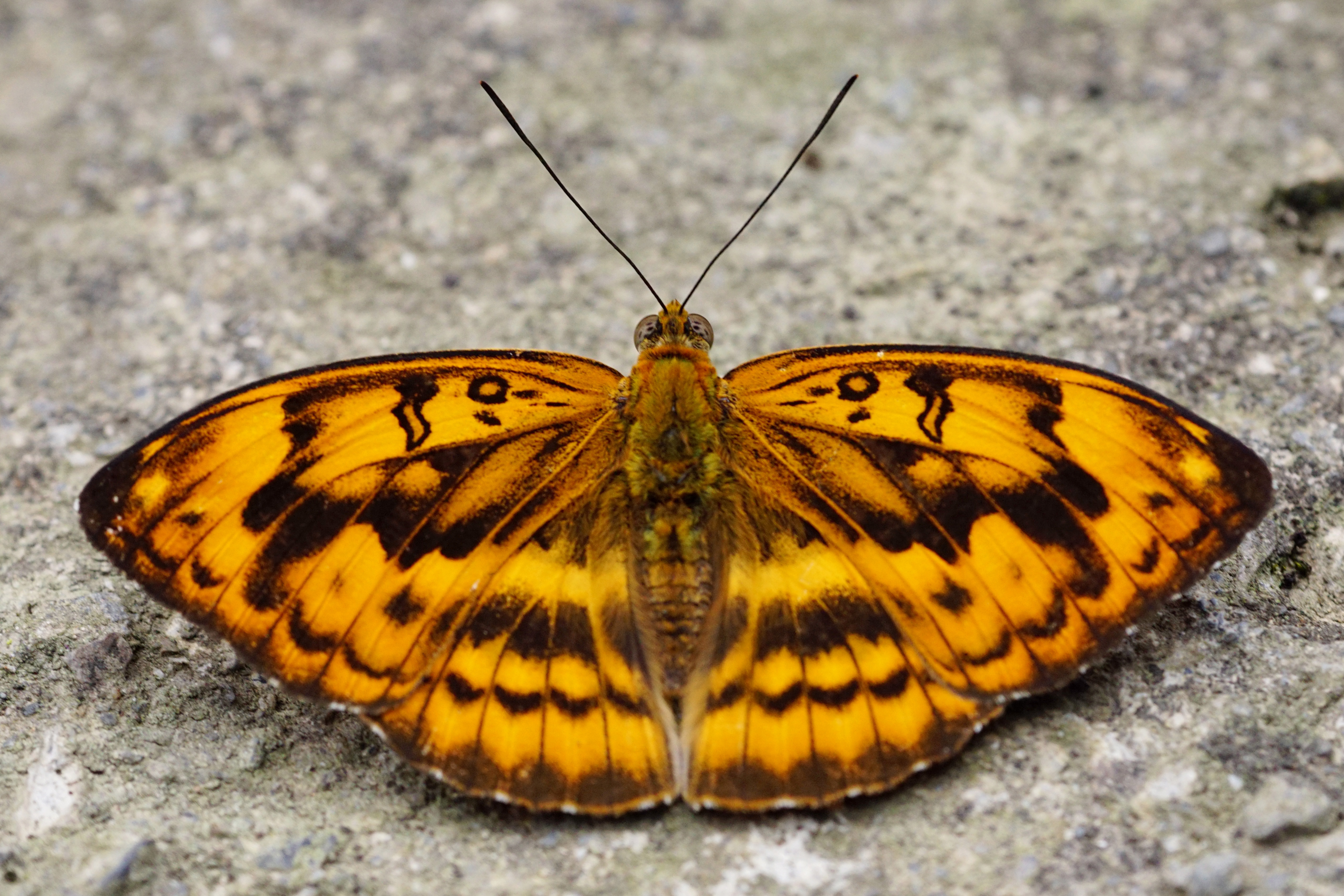 瑙蛺蝶 Abrota ganga formosana 雄